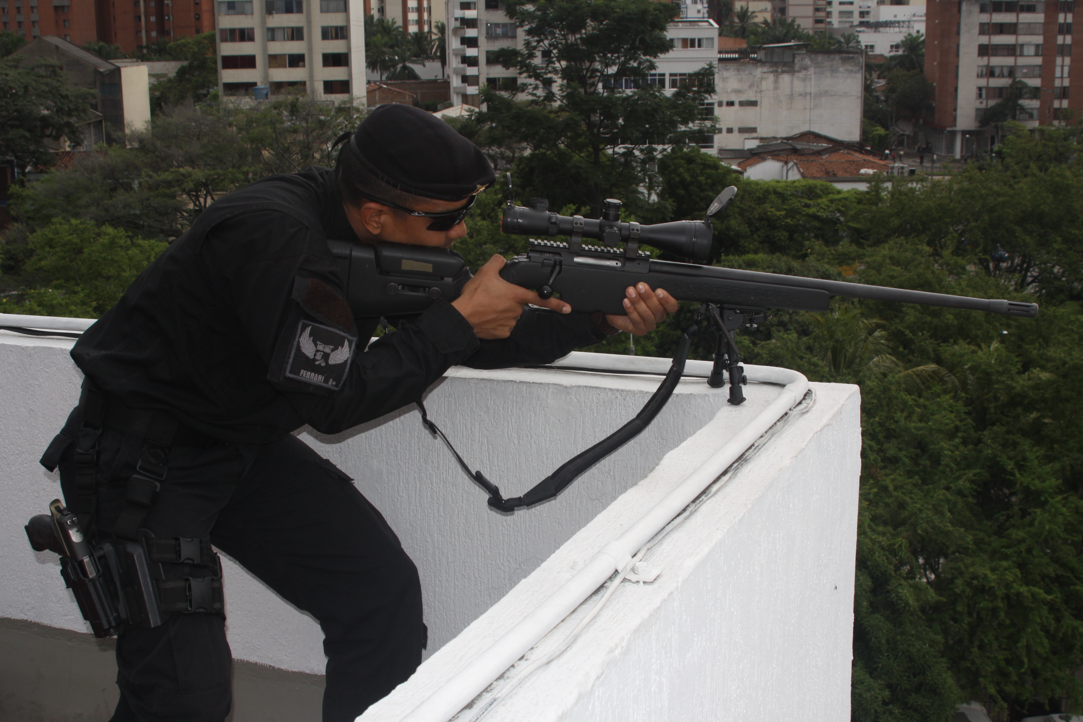 El 23 de mayo se llevará a cabo en la ciudad de Cali, la VII Cumbre de la Alianza del Pacífico, la cual contará con la participación de 9 Jefes de Estado, 10 delegaciones ministeriales y 300 empresarios de compañías de todo el mundo. “Aliados por la convivencia, unidos por la seguridad”